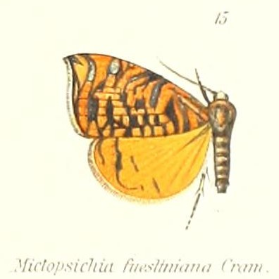 Rubropsichia fuesliniana